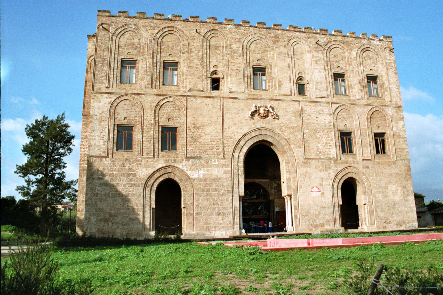 Zisa, Palermo Main facade